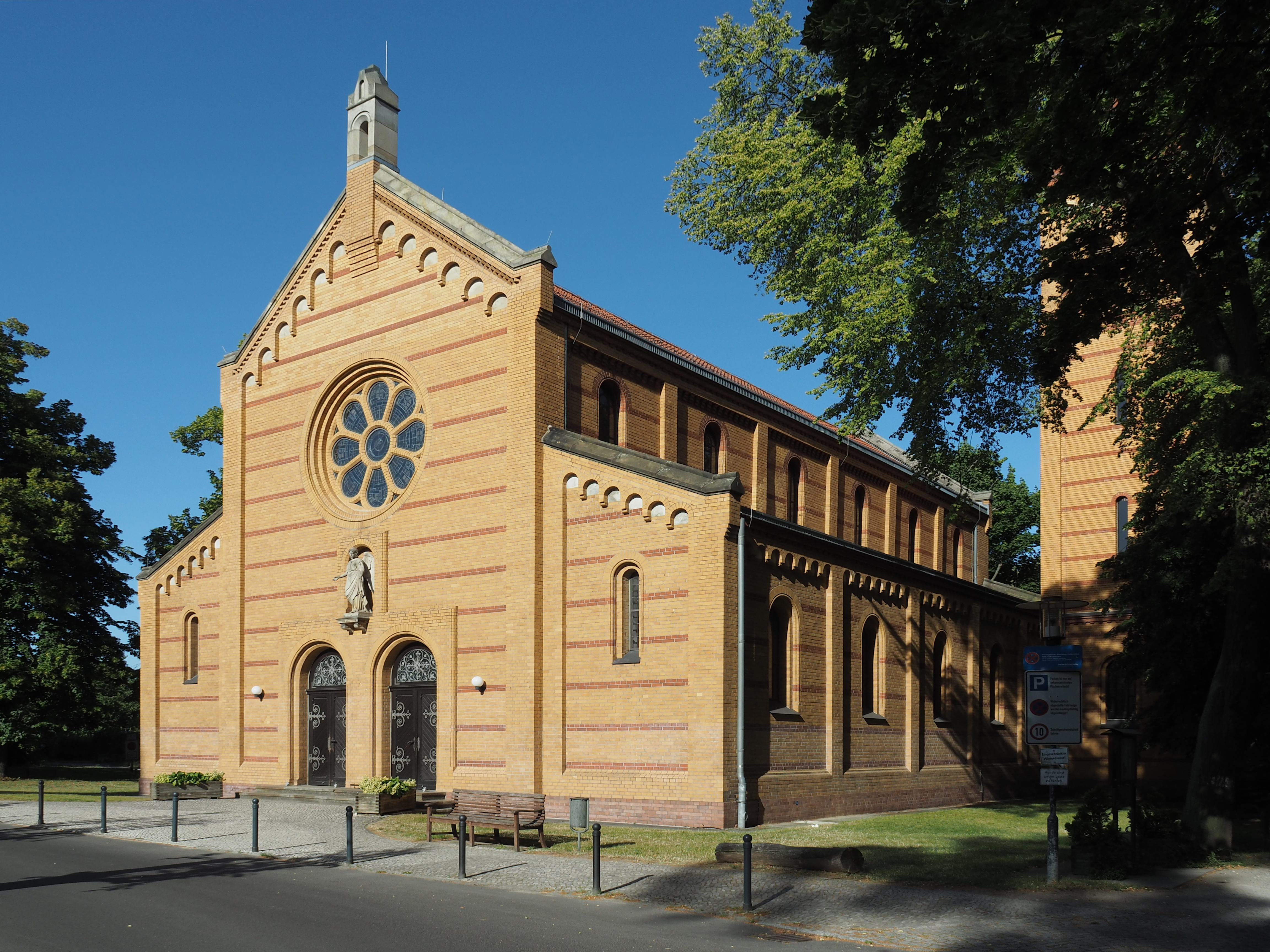 Wilhelm-Griesinger-Krankenhaus Krankenhauskirche